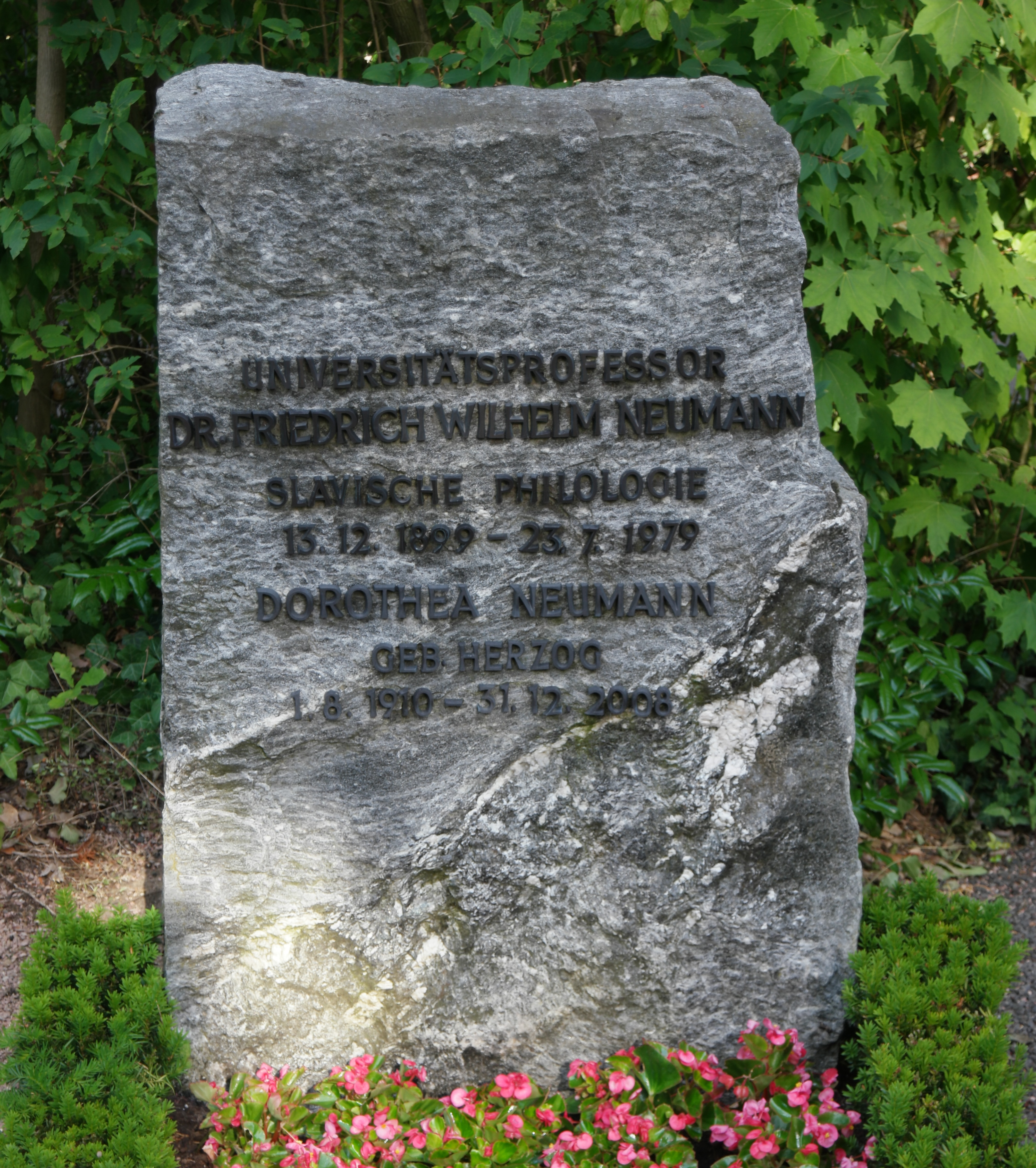 Grab des Philologen und Slawisten Friedrich Wilhelm Neumann, 1899-1979, auf dem Hauptfriedhof Mainz